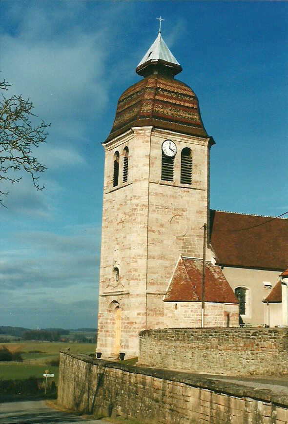 Église de Frasne-les-Meulières Frasne-les-Meulières Département du Jura, Franche-Comté, FRANCE